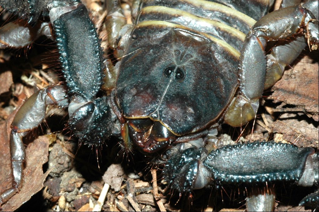 Hadogenes paucidens Pocock, 1896, Scorpiones, Hemiscorpiidae.